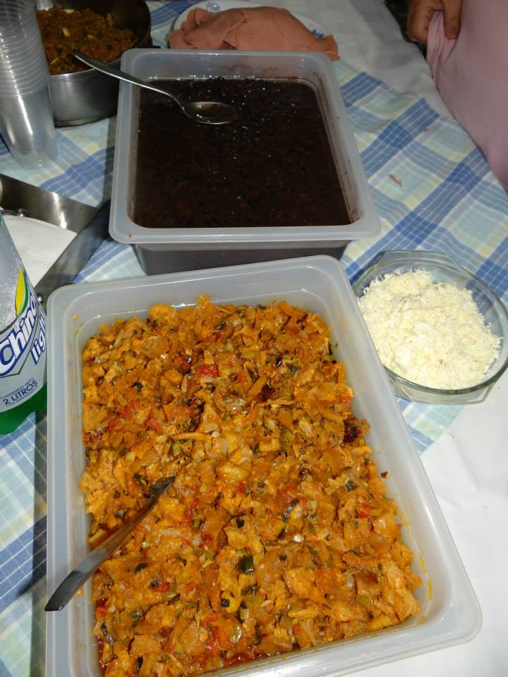 Caraotas, mojo de chicharron y queso.